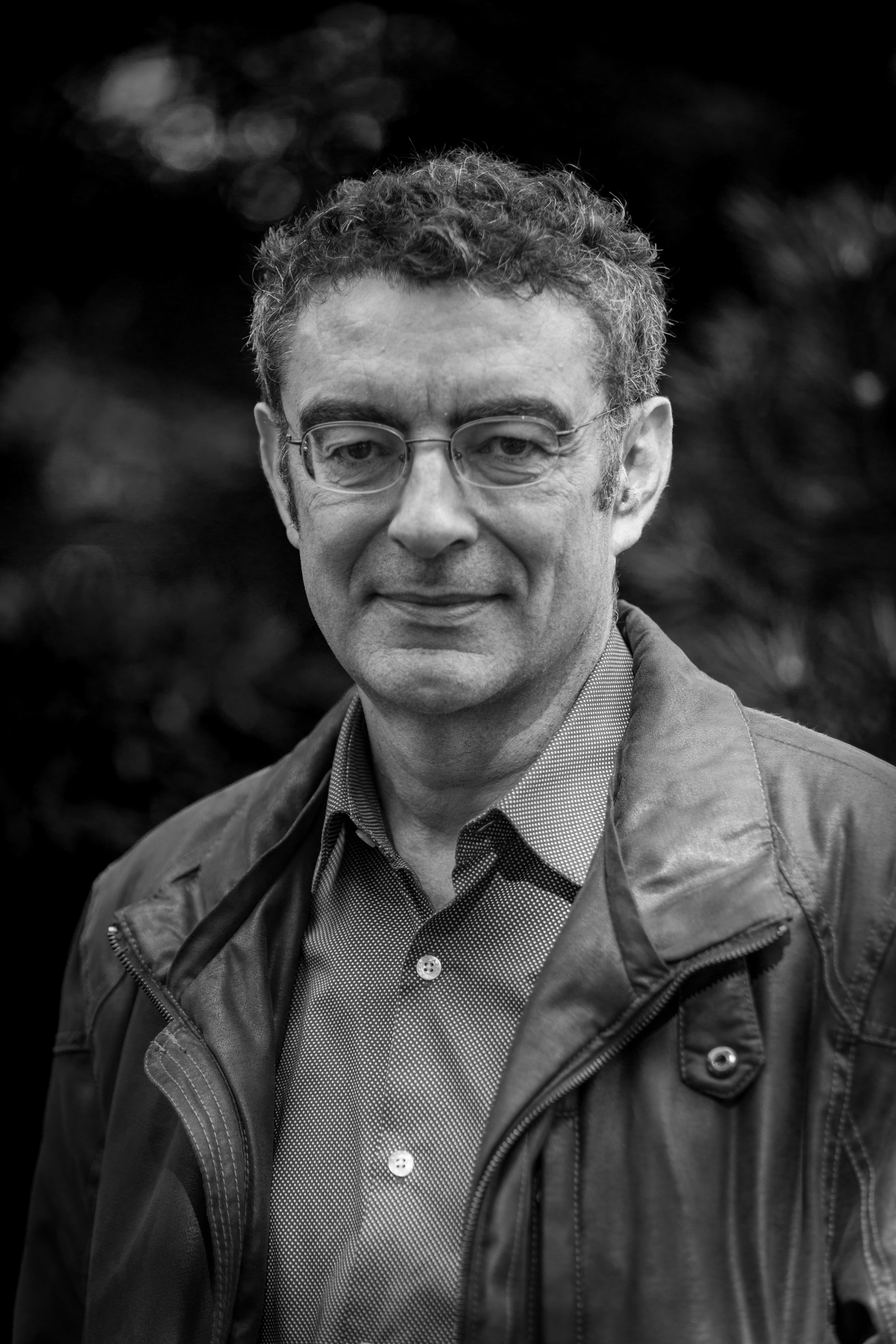 Gilles Palsky par Claude Truong-Ngoc octobre 2015